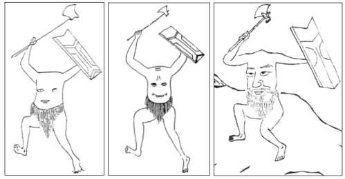 刑天《山海經》 2007/4/3 佚名作